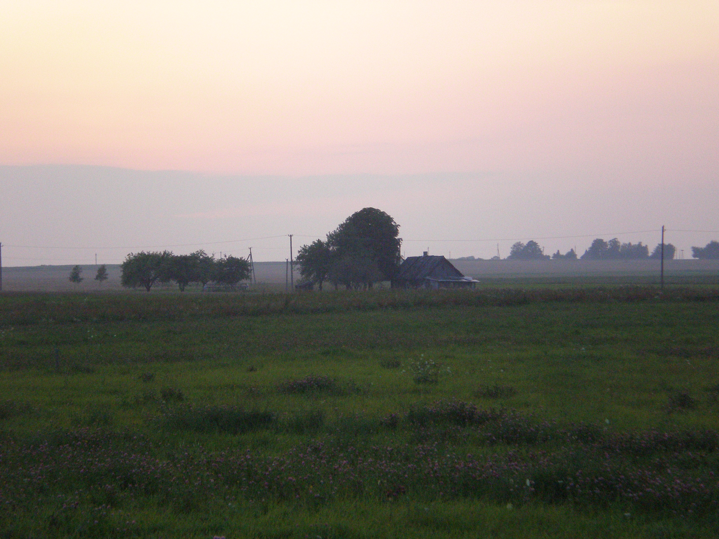 Evening in Pernarava Seniūnija, Lithuania